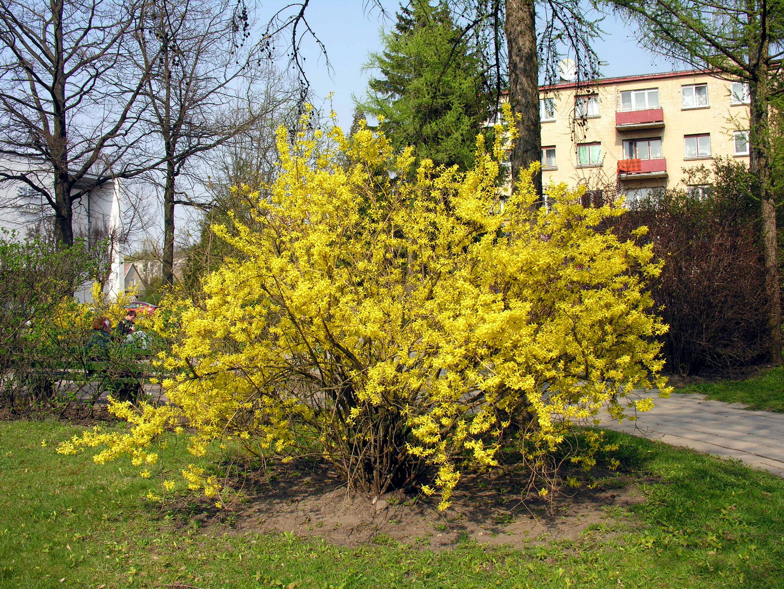 Tarpinė forsitija (Forsythia x intermedia) 2007 m. balandžio 27 d., Lietuva